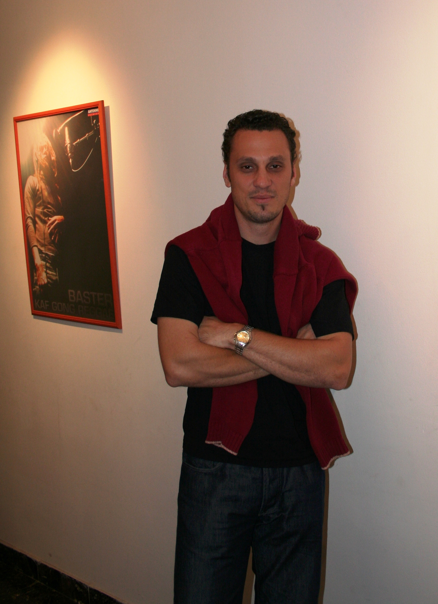 Meddy Gerville dans les couloirs du Théâtre de Champ-Fleuri.